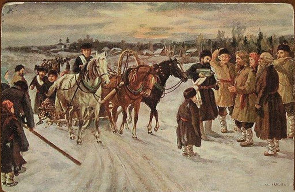 Деревенская свадьба. Выкуп дороги. Художник И.М. Львов. Открытка, изданная в 1912 г. в Москве И.Е. Селиным.